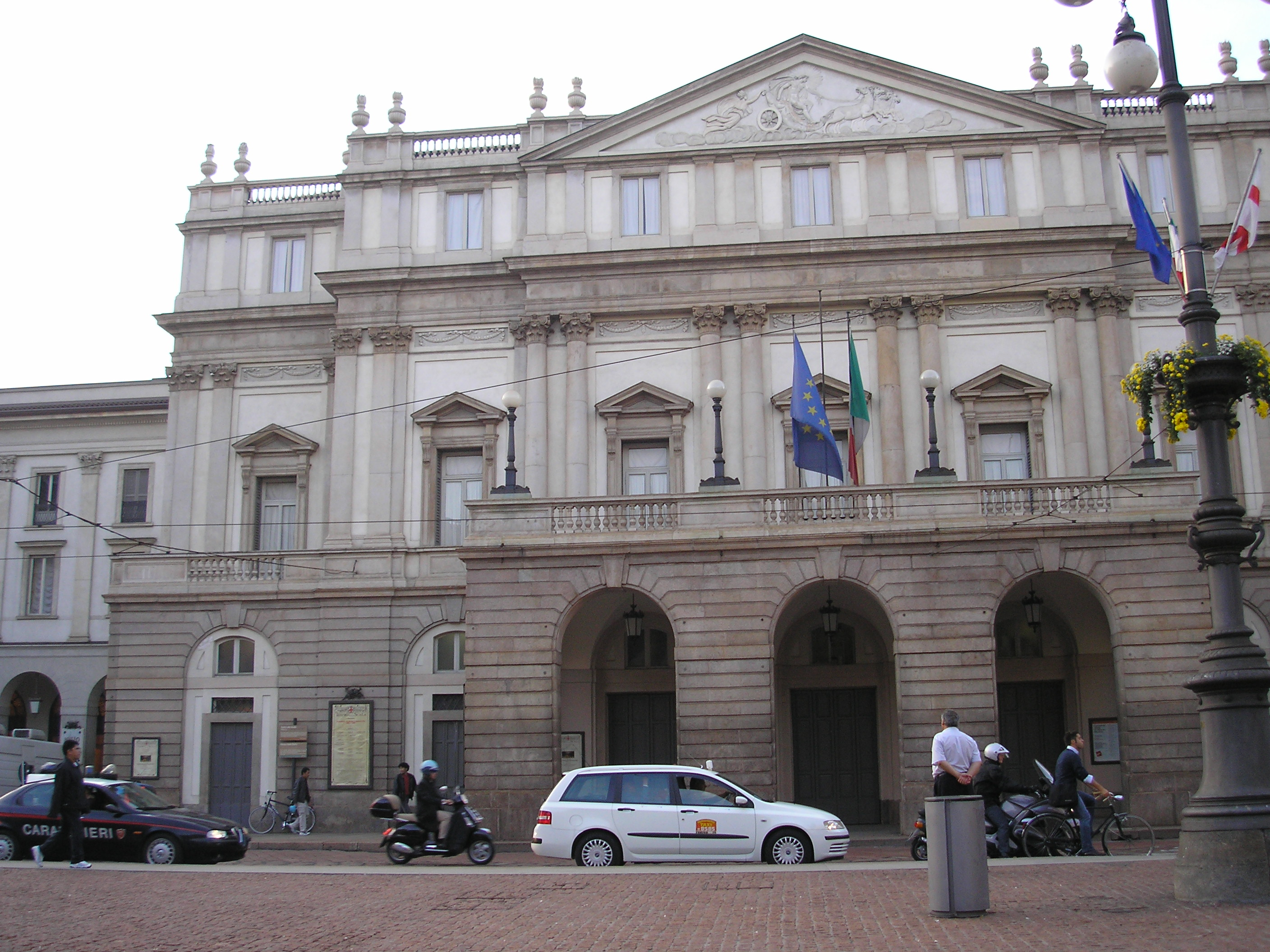 Teatro alla Scala